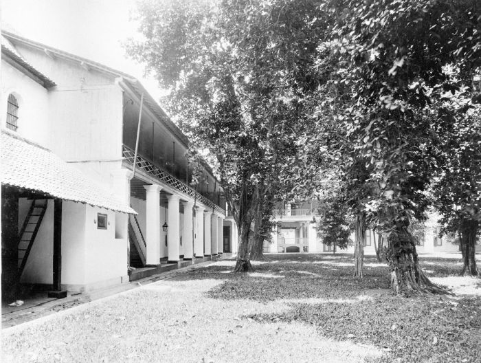 Foto. Het gebouw van de Javasche Bank te Batavia gezien vanuit de binnentuin.